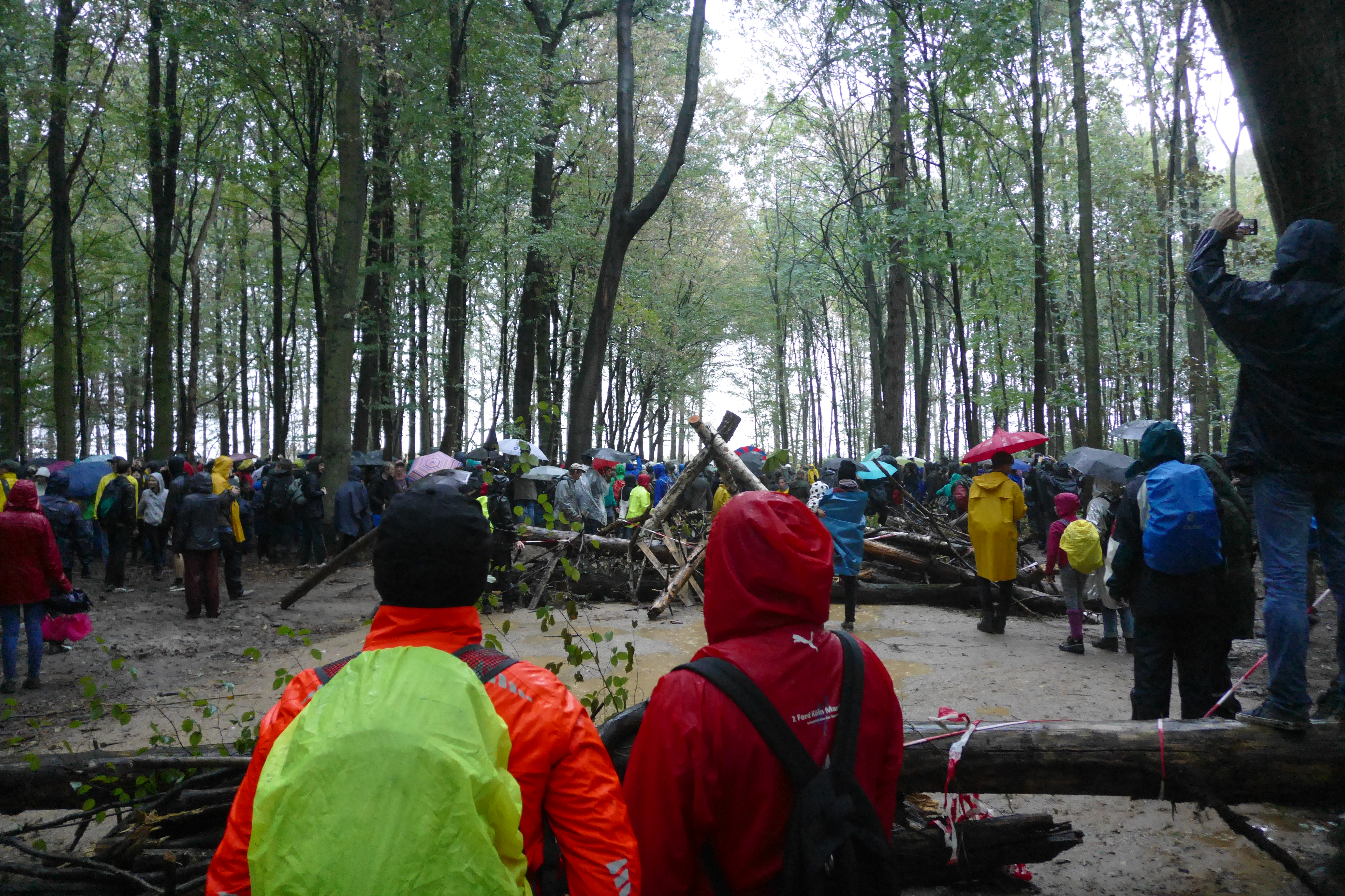 Neuerrichtete Barrikaden am 23.09.2018 in der Bürge, ein "leicht feuchter" Tag im September 2018.